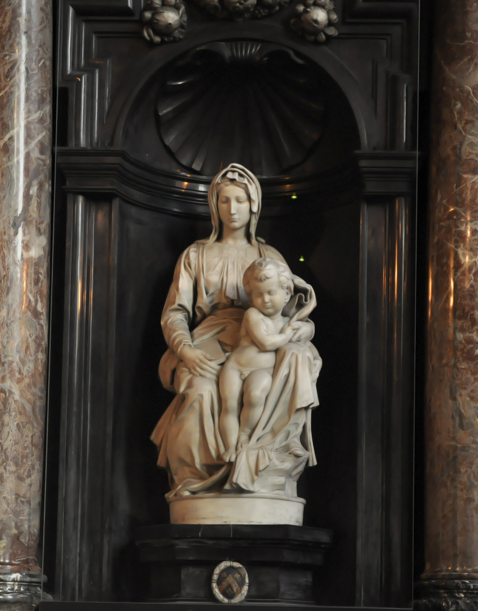 Michelangelo Buonarroti - Maria met kind (1502) - in de OLV-kerk te Brugge